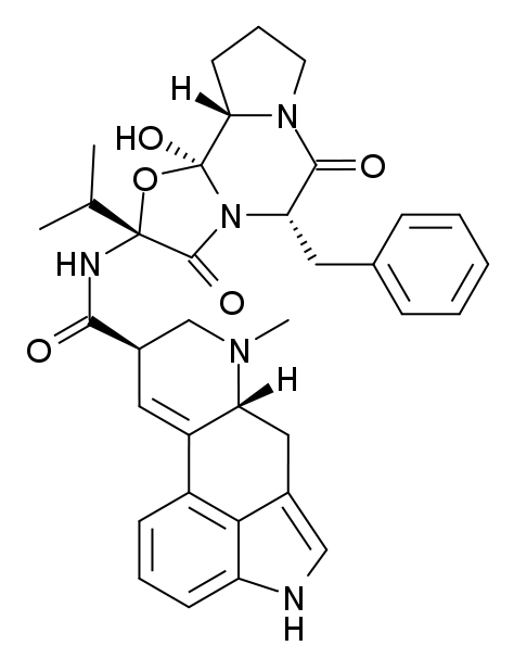 Ergocristine